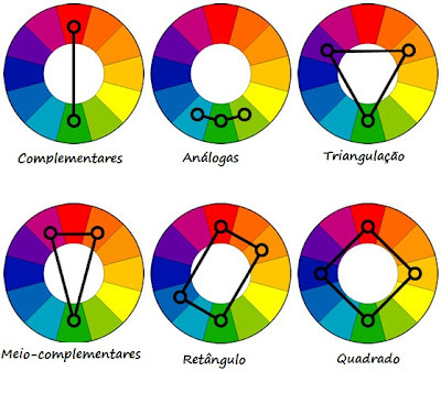 Nesta imagem sao representadas as possiveis combinacoes de cores.